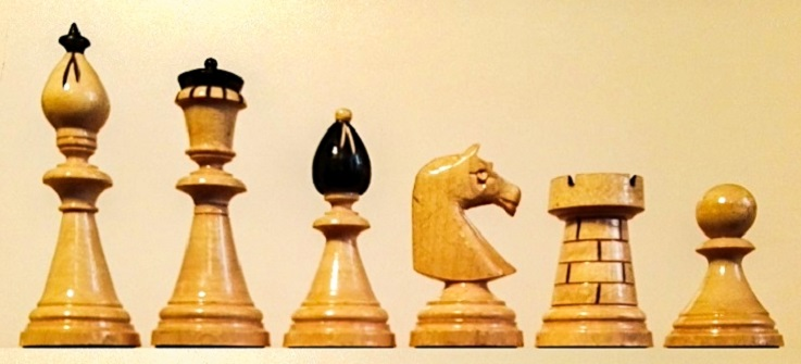 Šachové figurky navržené Bohuslavem Schnirchem (české klubovky)